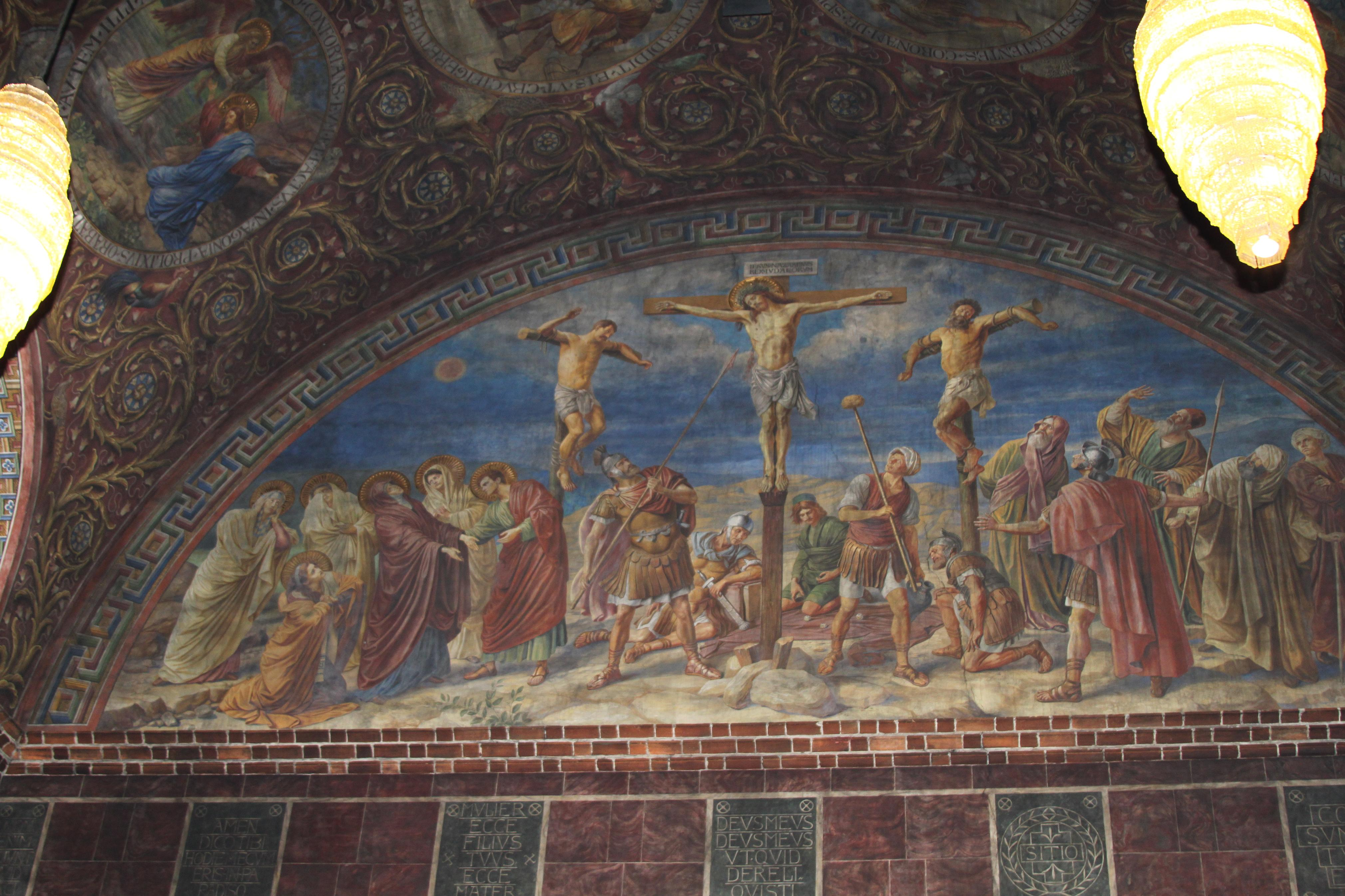 Berlin, Rosenkranz-Basilika, Wandbild Kreuzigung Christi